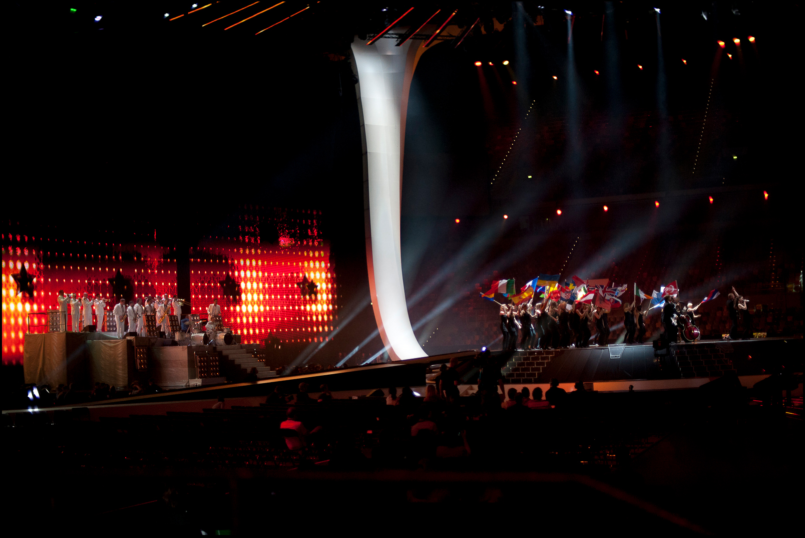 Eurovision Song Contest Dusseldorf 2011 Nikon d700, Nikkor 50 1.4g